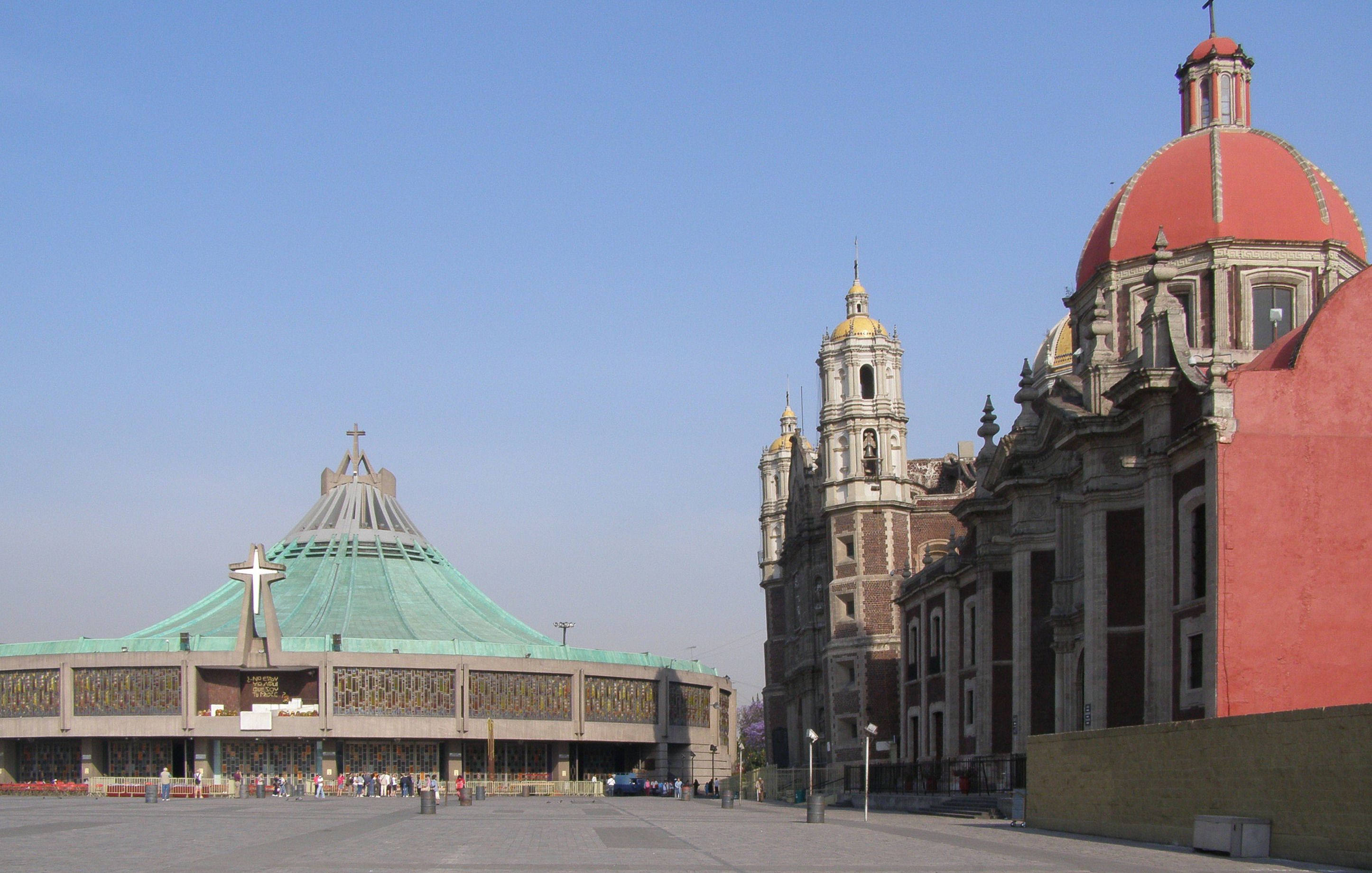 A gauche la basilique moderne, à droite le couvent des Capucins, au centre l'ancienne basilique Notre-Dame de Guadaloupe, qui penche de près de 3° à cause du terrain spongieux sur lequel elle est construite - Mexico-city (Mexique)